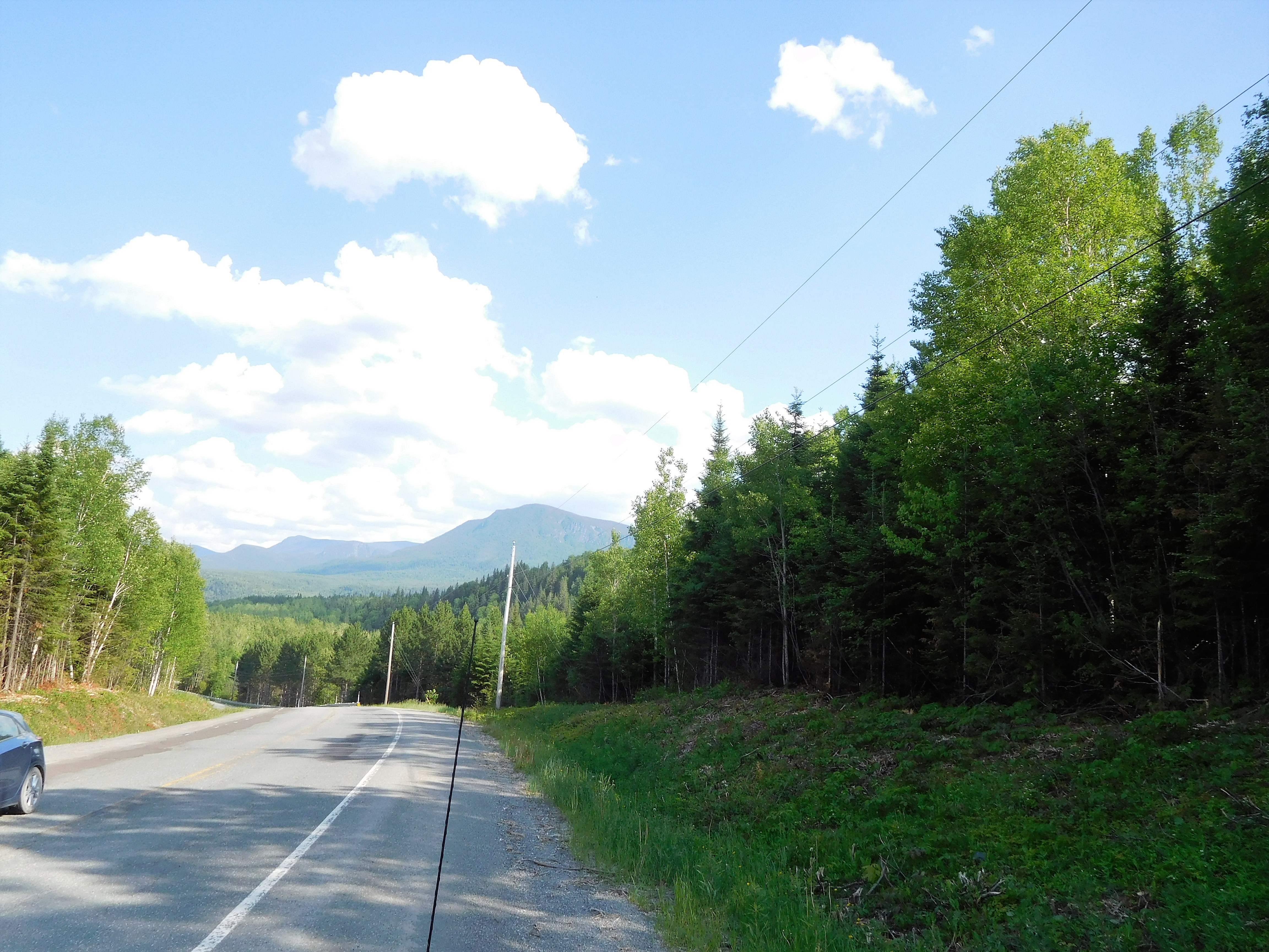 Route 299 (du parc de la Gaspésie), Québec